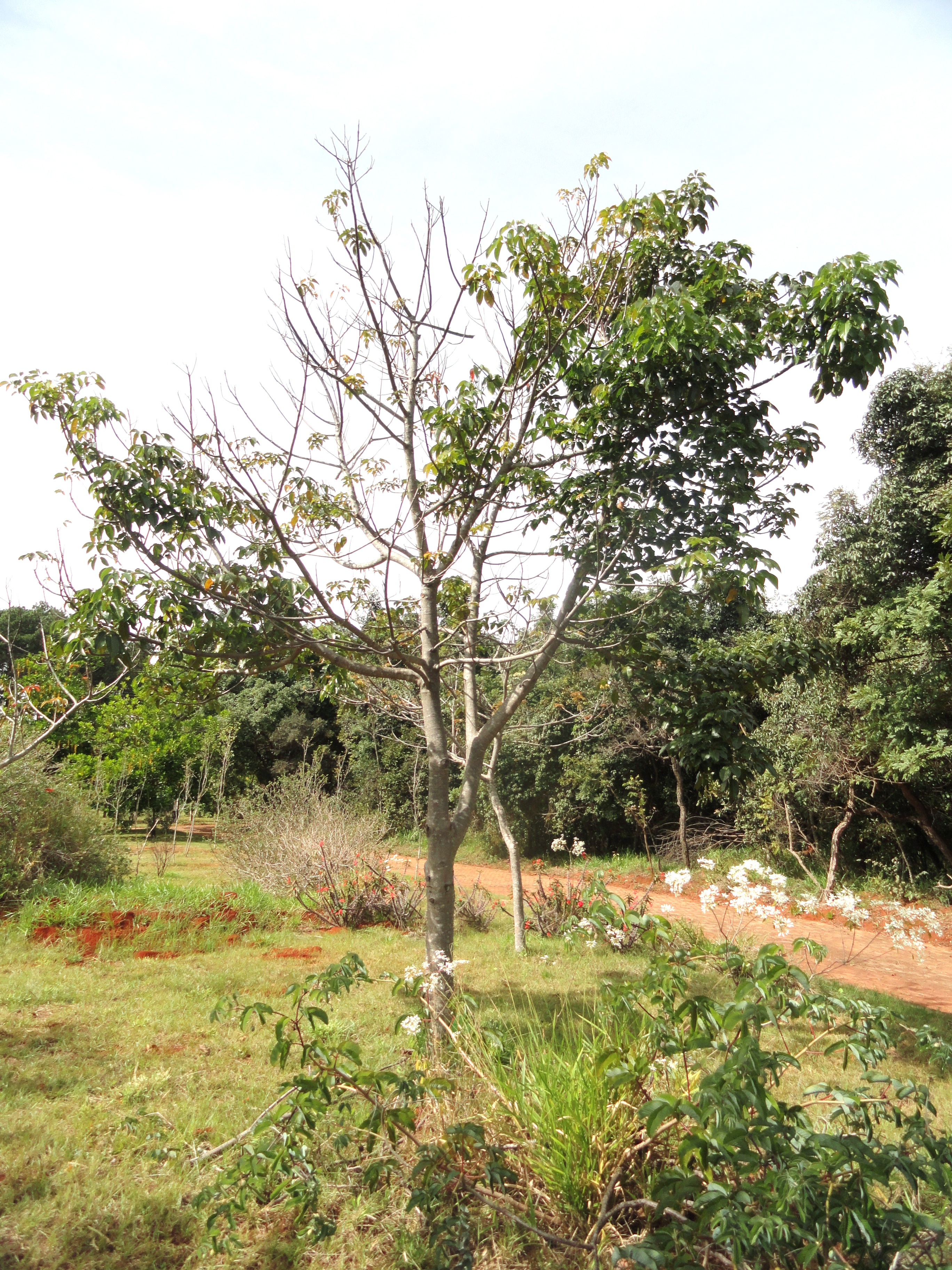 Botanical specimen in the Jardim Botânico de Brasília, Brasília, Brazil.